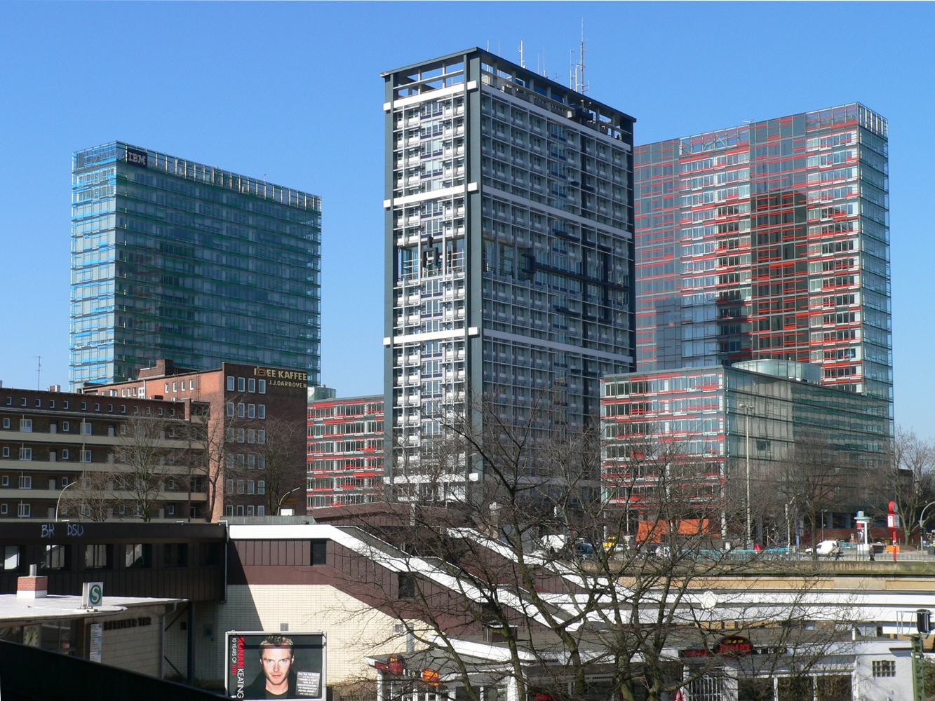 Baukomplex Berliner Tor Center in Hamburg, in der Mitte das ehemalige Polizeipräsidium (1962), Flügelbauten mit Glasfassaden 2004, im Vordergrund die Schnellbahnhaltestelle Berliner Tor.